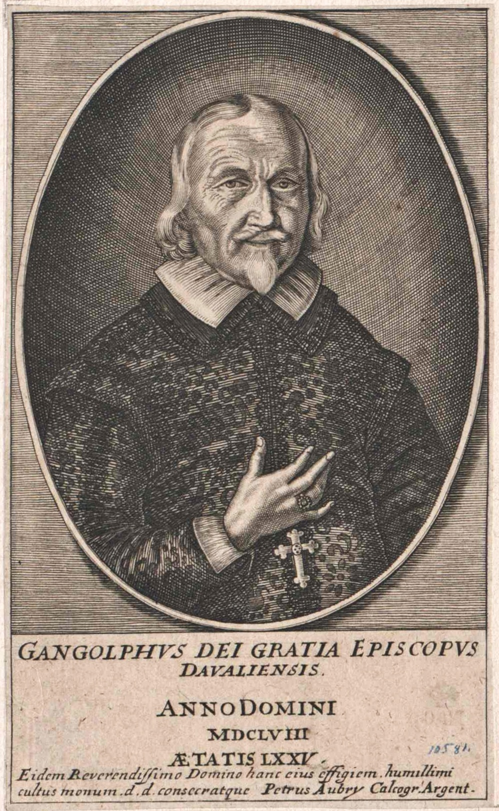 Gangolf Ralinger, auch Rallinger oder Railinger (ca. 1587-1663), Titularbischof von Daulia, Weihbischof von Speyer